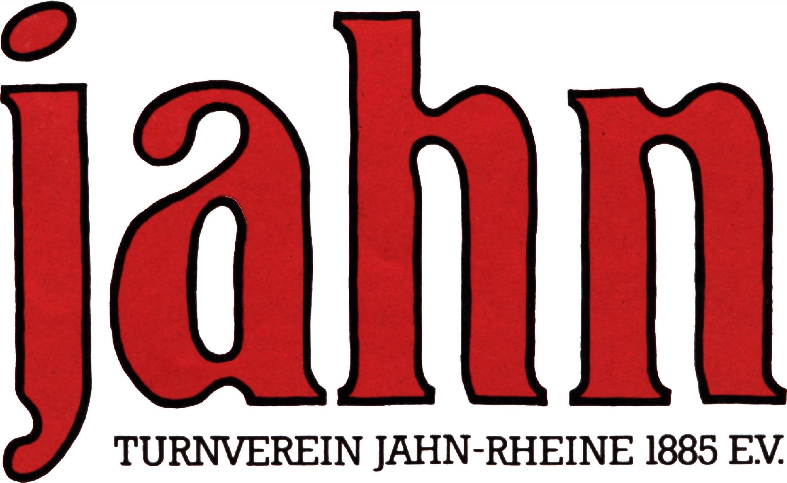 Logo des Turnverein Jahn-Rheine 1885 e.V.